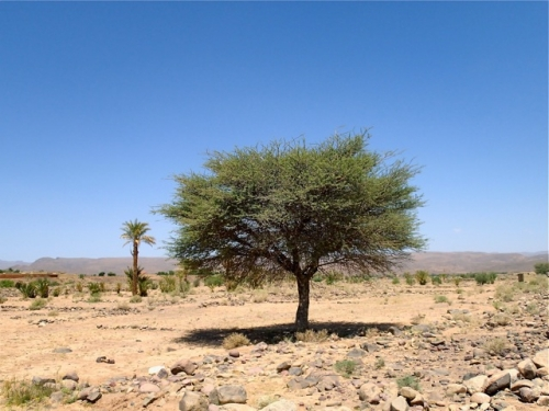 Parfaitement adapté aux zones arides, l’acacia raddiana résiste à des températures de 50°c, et peut se contenter de moins de 100 mm d’eau par an. Plante fourragère, de nombreux animaux du désert (comme cette chenille) apprécient ses feuilles, fleurs, fruits... et se son accommodés de ses épines impressionnantes (son nom générique dérive du grec (Akakia) qui signifie « épines »). la suite sur